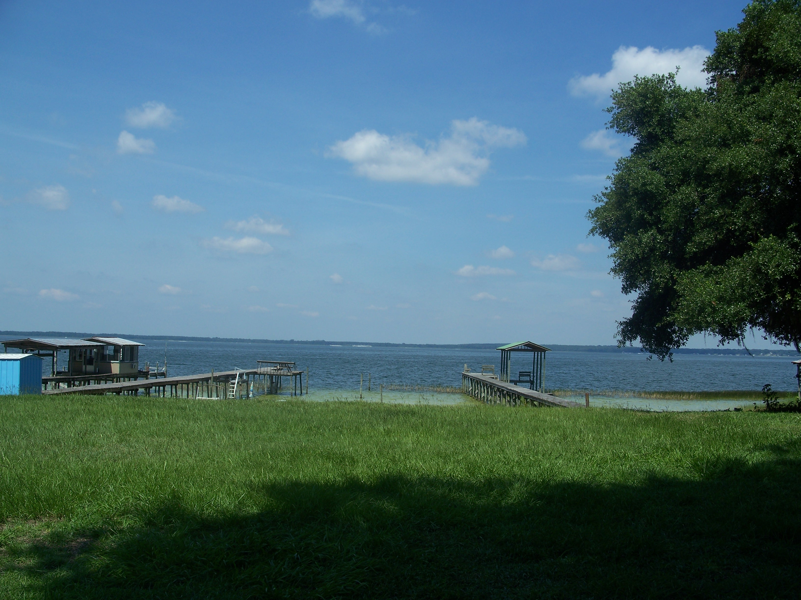 Lake Weir